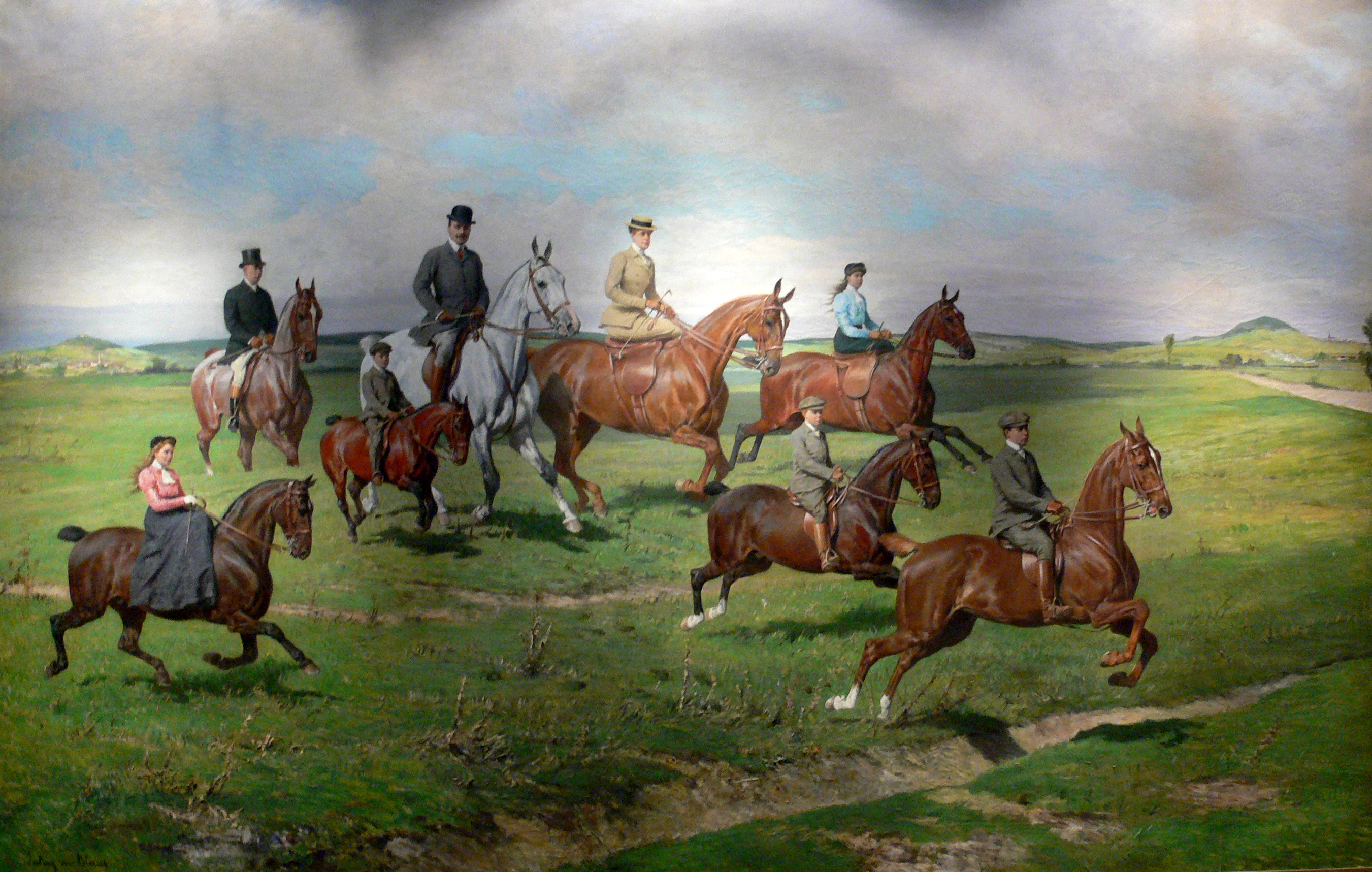 Von links nach rechts: Prinzessin Anna (Netti) (auf „Scherz“) Stallmeister Howe (auf „Strawberry“) Prinz Karl Friedrich (Fritz) (auf „Daisy“) Fürst Max Egon II. (auf „Granit“) Fürstin Irma (auf „Miss Naps“) Prinz Max Egon (auf „Cock Robin“) Prinzessin Leontine (Lotte/Lotti) (auf „Cranberry“) Erbprinz Karl Egon (auf „Dum-Dum“) Ganz links der Wartenberg, ganz rechts der Fürstenberg.